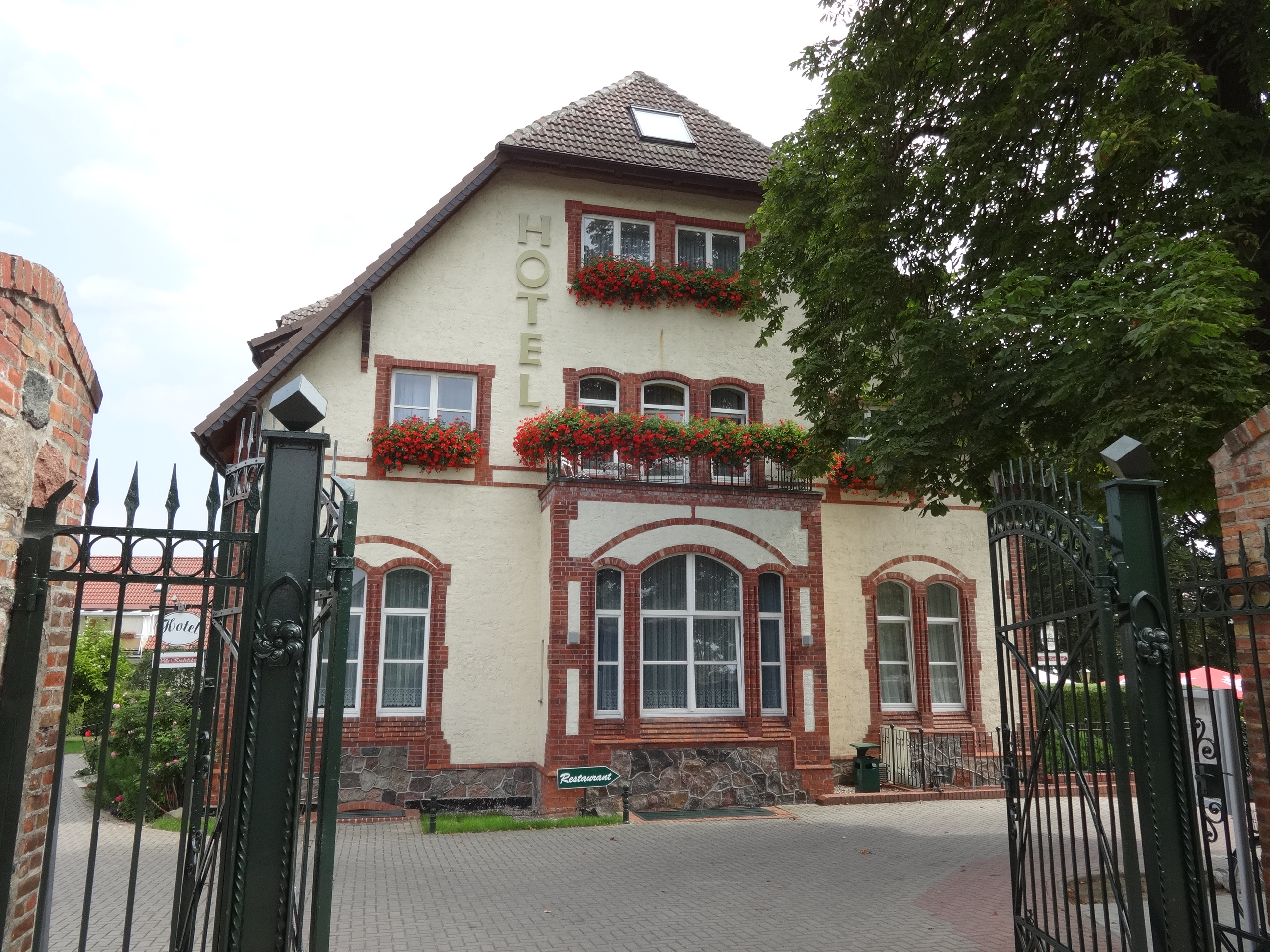 Denkmalgeschützte Villa in Pasewalk. Erbaut 1897 als Sitz des Kommandeurs des Kürassier-Regiments, heute Hotel mit Restaurant